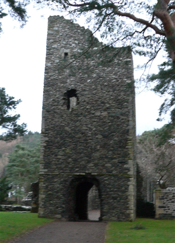 Cross Kirk, Peebles (Scotland) - entrance / tower